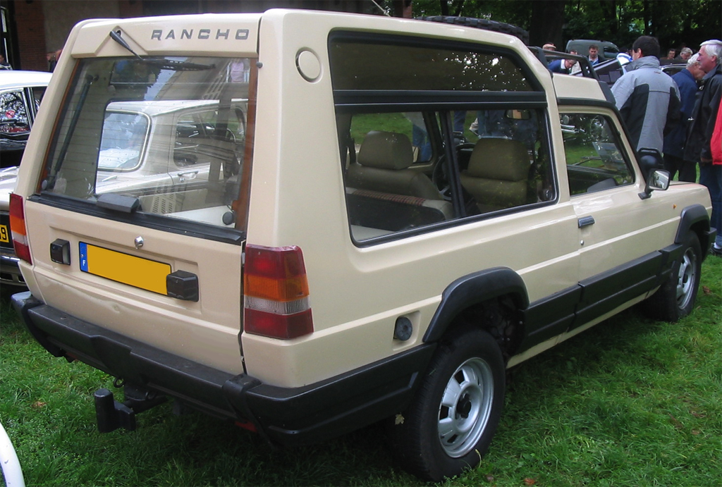 Matra rancho photographiée à un rassemblement d'anciennes